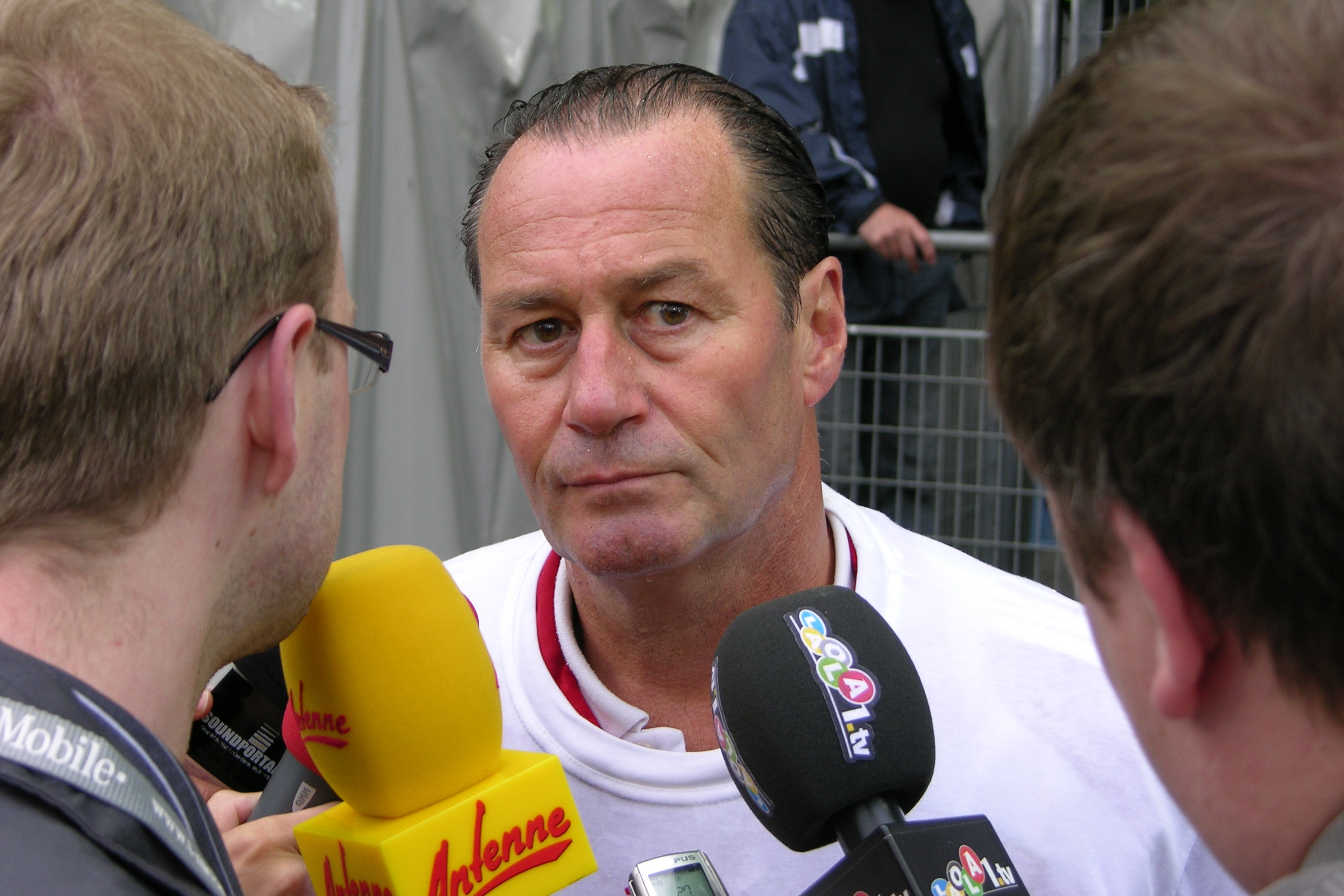 Bundesligameisterschaftsfinale 2009/2010 Sturm : Salzburg